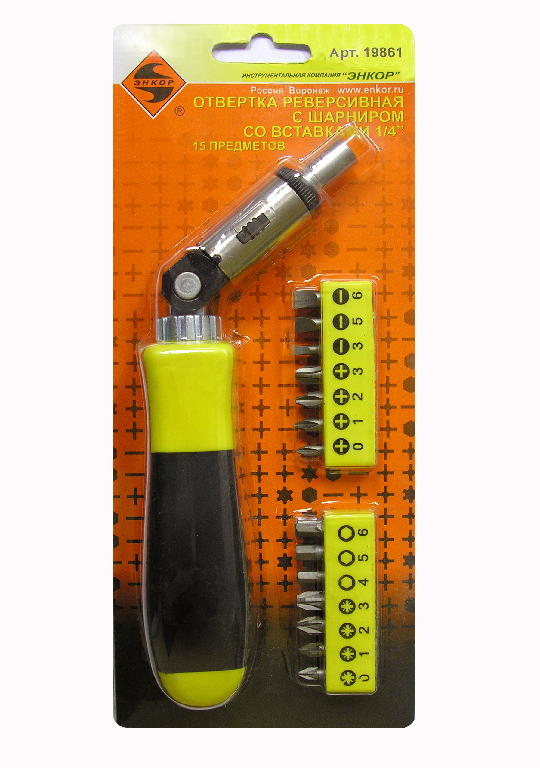 Реверсивная отвёртка с поворотной рукояткой. Для переключения направления вращения служит ползунковый переключатель.